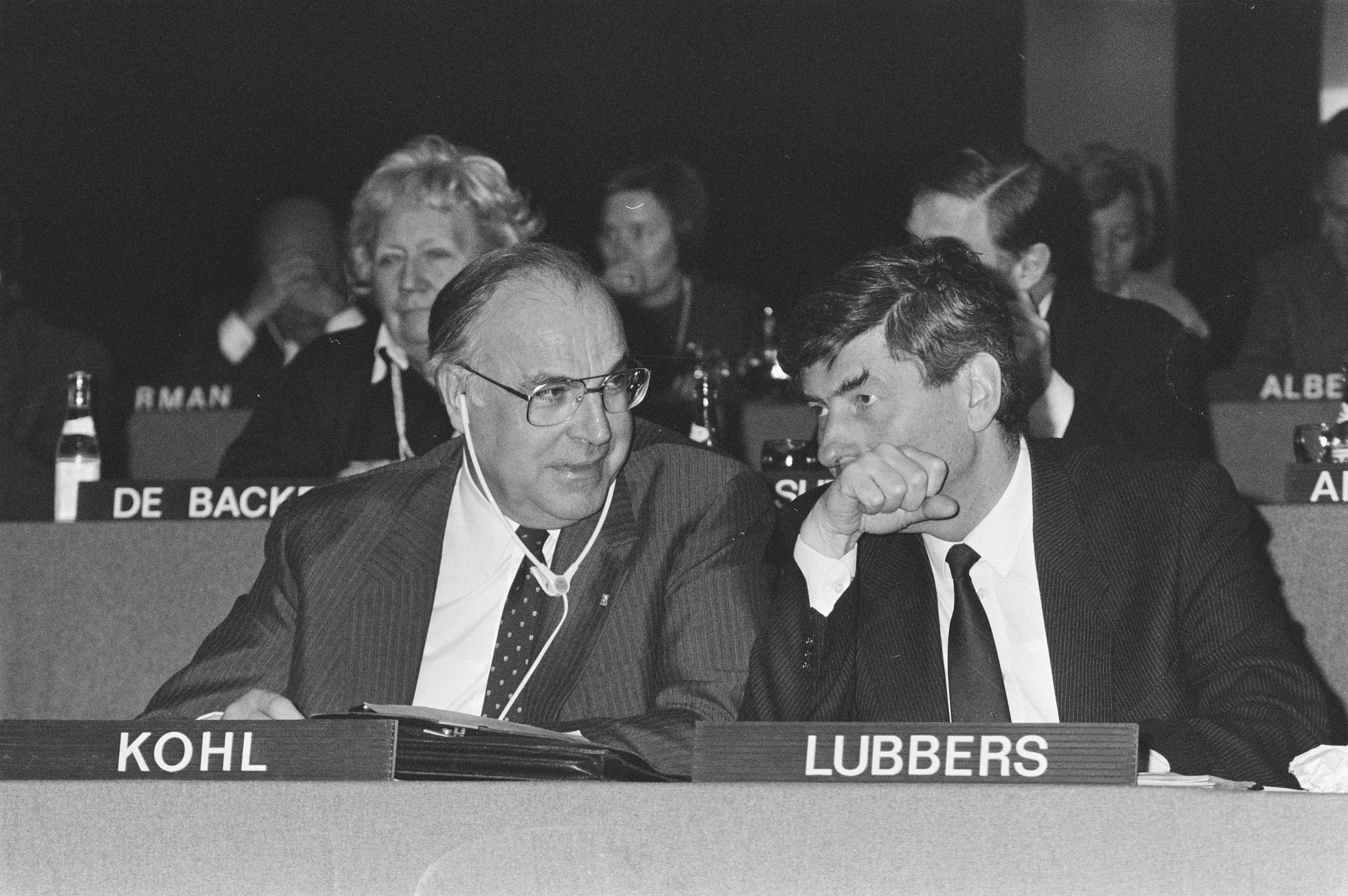 Collectie / Archief : Fotocollectie Anefo Reportage / Serie : Congres van de Europese Volkspartij 1986 te Den Haag Beschrijving : Bondskanselier Kohl van West-Duitsland in gesprek met minister-president Ruud Lubbers Datum : 12 april 1986 Locatie : Den Haag, Zuid-Holland Trefwoorden : conferenties, economie, minister-presidenten Persoonsnaam : Kohl, Helmut, Lubbers, Ruud Fotograaf : Fotograaf Onbekend / Anefo Auteursrechthebbende : Nationaal Archief Materiaalsoort : Negatief (zwart/wit) Nummer archiefinventaris : bekijk toegang 2.24.01.05 Bestanddeelnummer : 933-6218